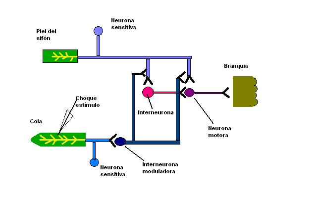 Mecanismos subyacentes uno la sensibilización un Corto Plazo